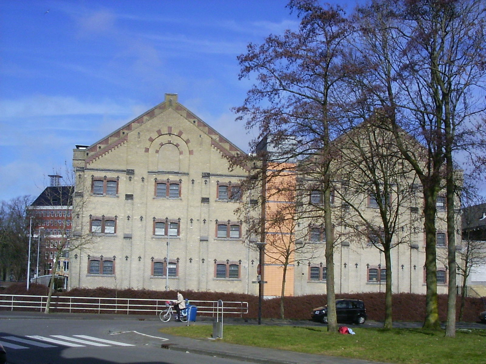 BIJZONDERE STRAFGEVANGENIS EN HUIS VAN BEWARING thans alleen Huis van Bewaring, gebouwd door J.F. Metzelaar en W.C. Metzelaar op het terrein van het Blokhuis in Eclectische stijl.